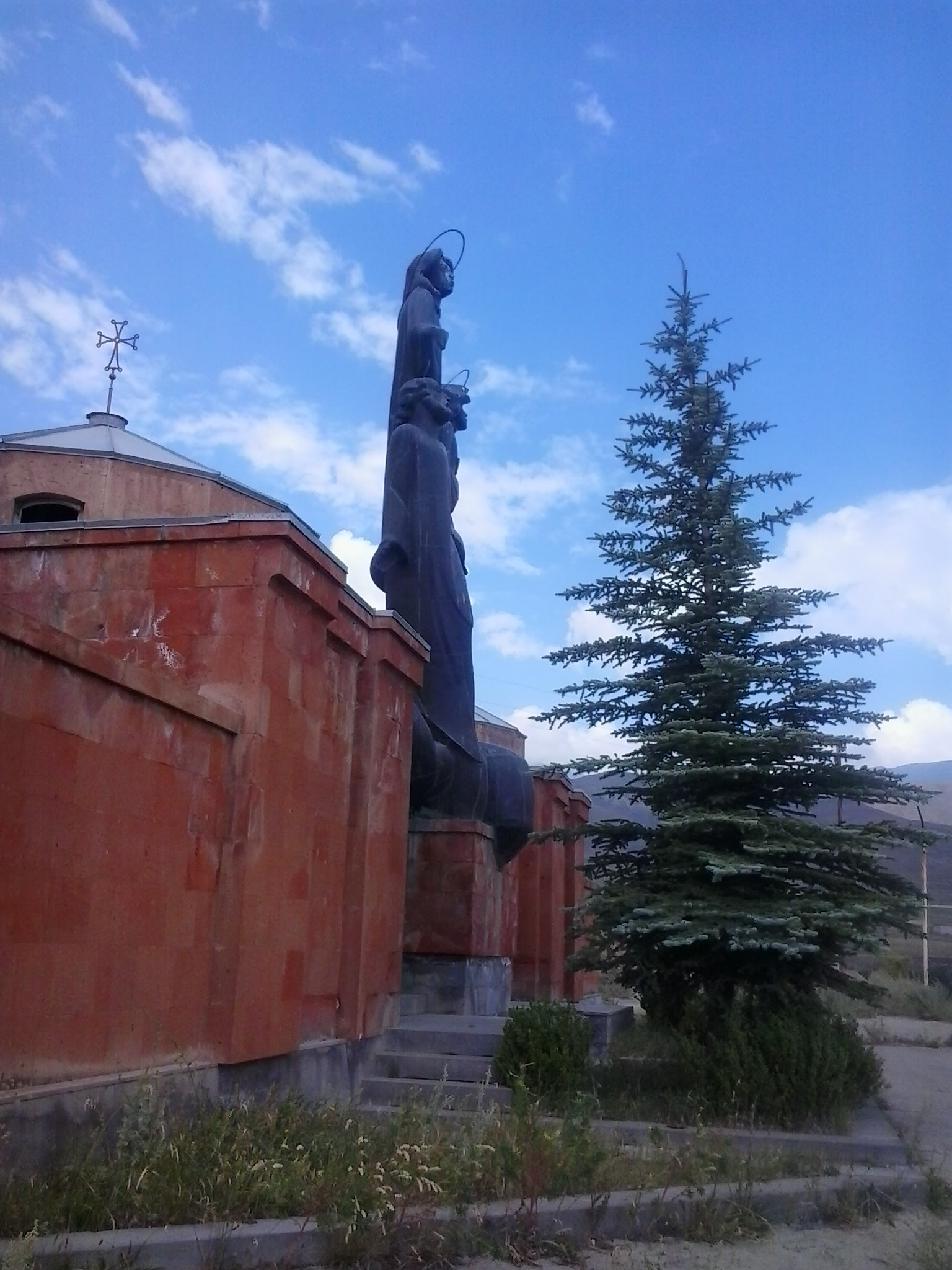 ԱՐևԱՇՈՂՈՒՄ 21/6